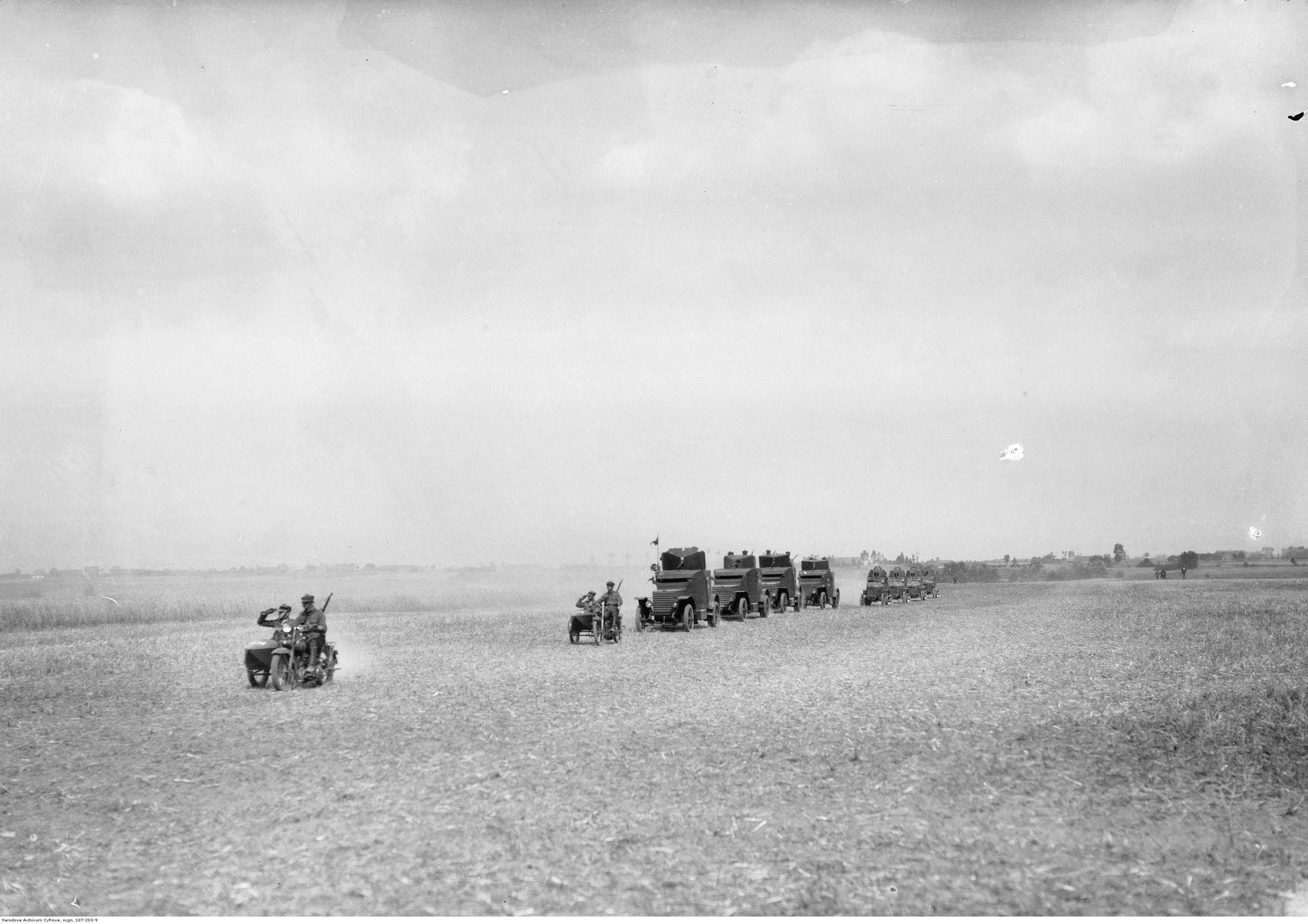 2 Szwadron Samochodów Pancernych podczas defilady. Za motocyklami samochody pancerne Peugeot 1918. Na końcu półgąsienicowe samochody pancerne wz. 28.